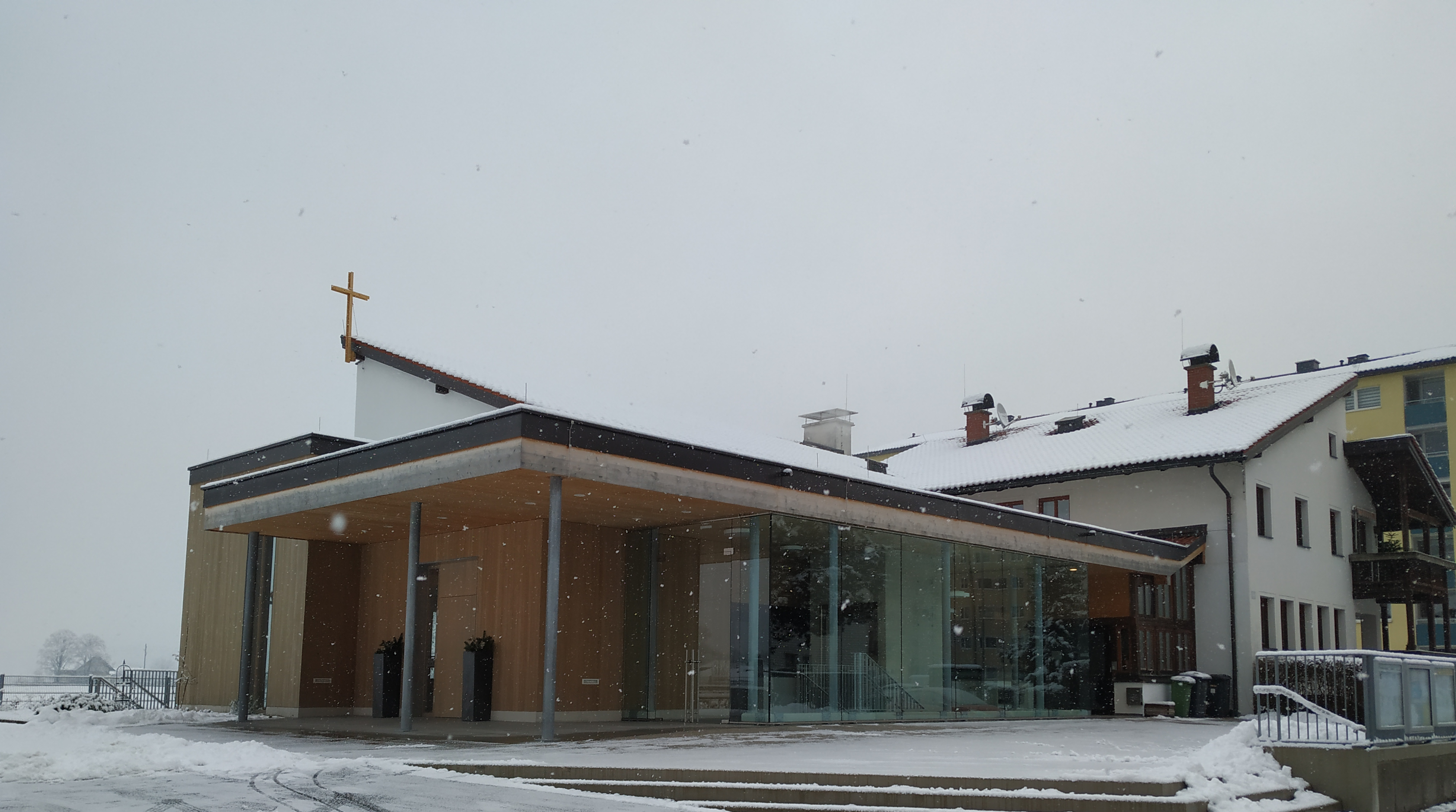 Pfarrzentrum Hallein-Neualm, Pfarrkirche Hallein-Neualm Heiliger Josef der Arbeiter